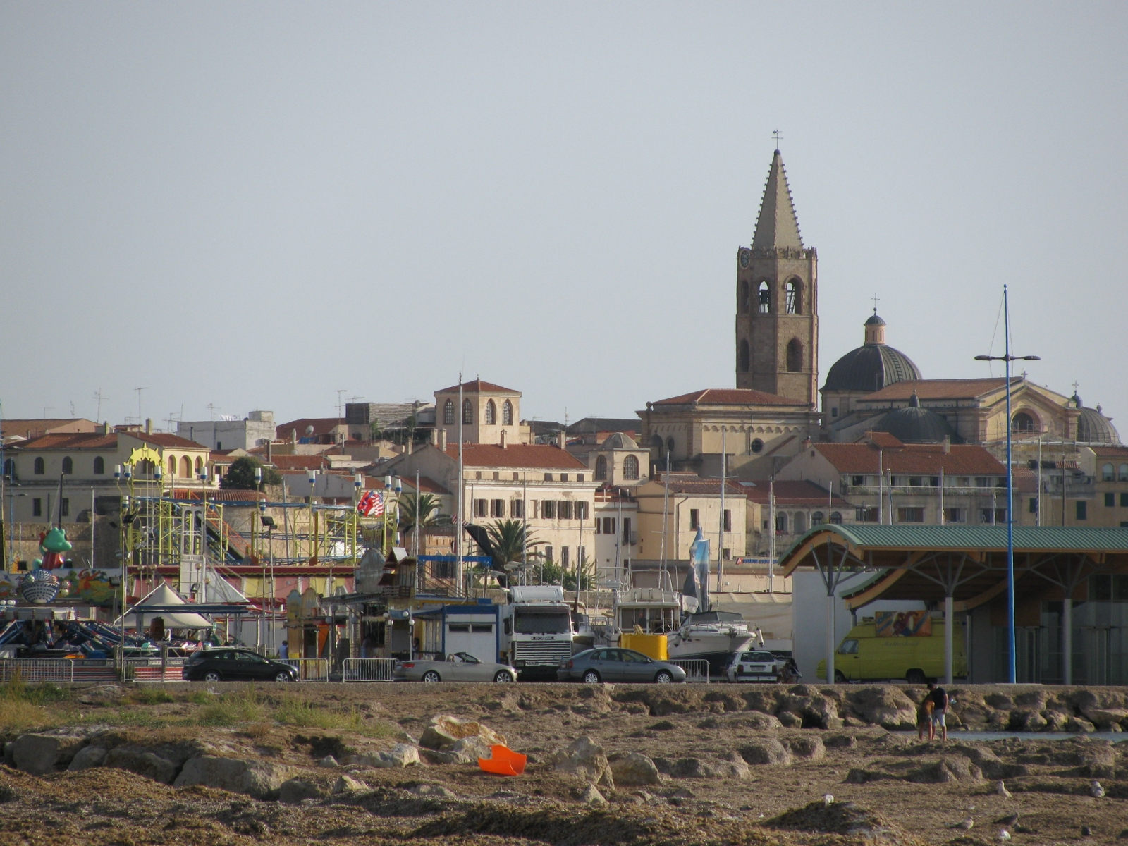 Alghero dal lungomare